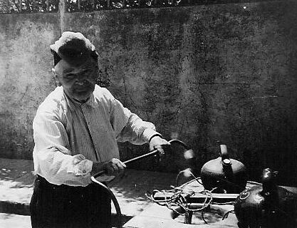 Jaume Traveries i Riera (Sant Hilari Sacalm, 1871-1955), més conegut com a Jaumet del flabiol fou un personatge popular de Sant Hilari Sacalm. Era mut i menut. Sempre amb barretina, tocava el flabiol i amb un carret portava càntirs d'aigua de la Font Vella fins al poble. El seu nom va servir per batejar uns dolços (jaumets) fets d'avellana creats per la pastisseria Fornés de la plaça de l'església i que encara es venen a Sant Hilari.